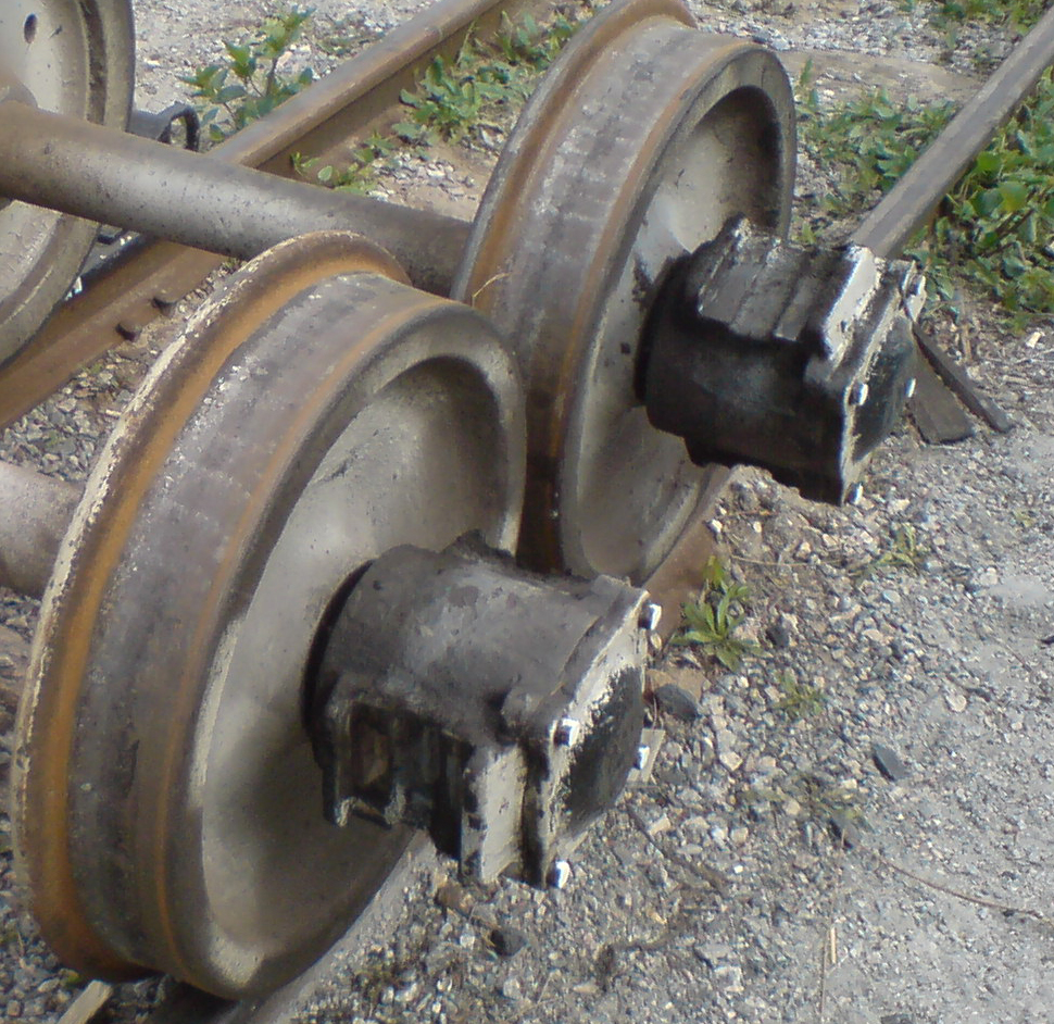 Челюсна вагонна букса